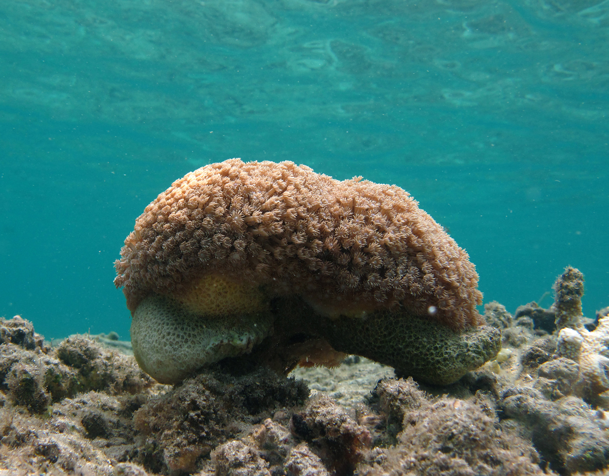 Corail du genre Goniopora à la Réunion.